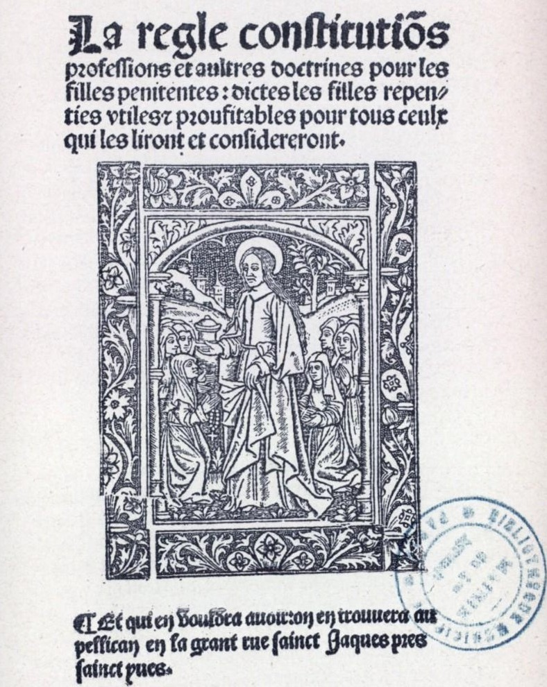 Vêtement religieux des Filles Pénitente